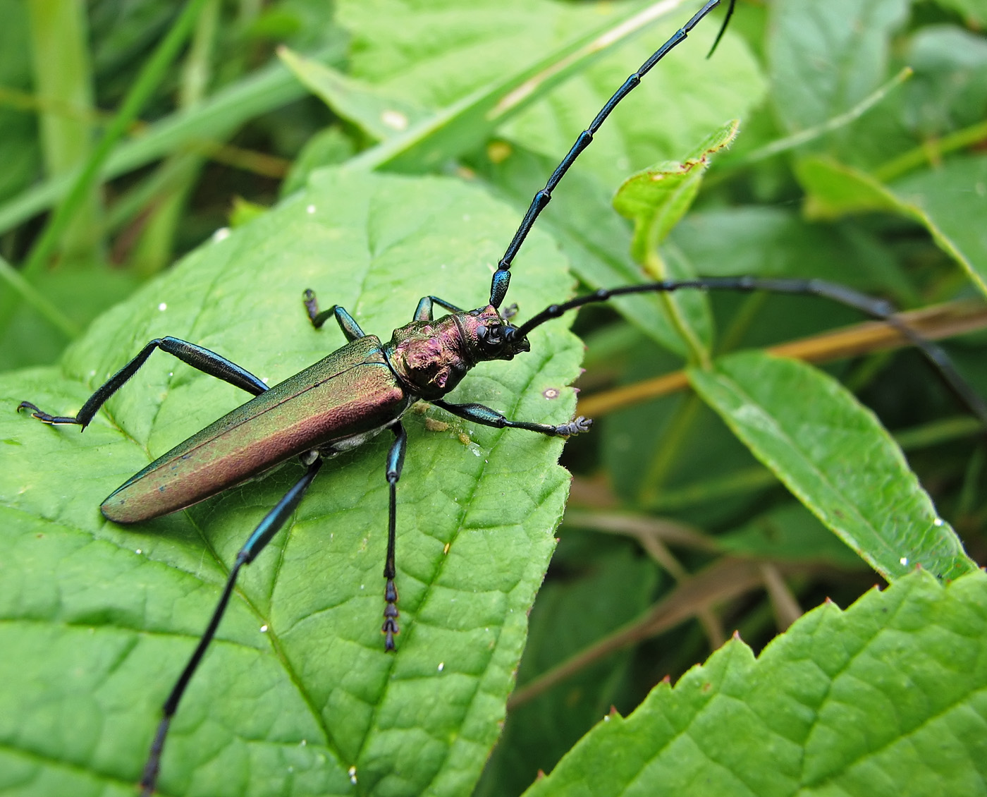 Beschreibung: Moschusbock (Aromia moschata) Fotograf: Darkone, 16. August 2005